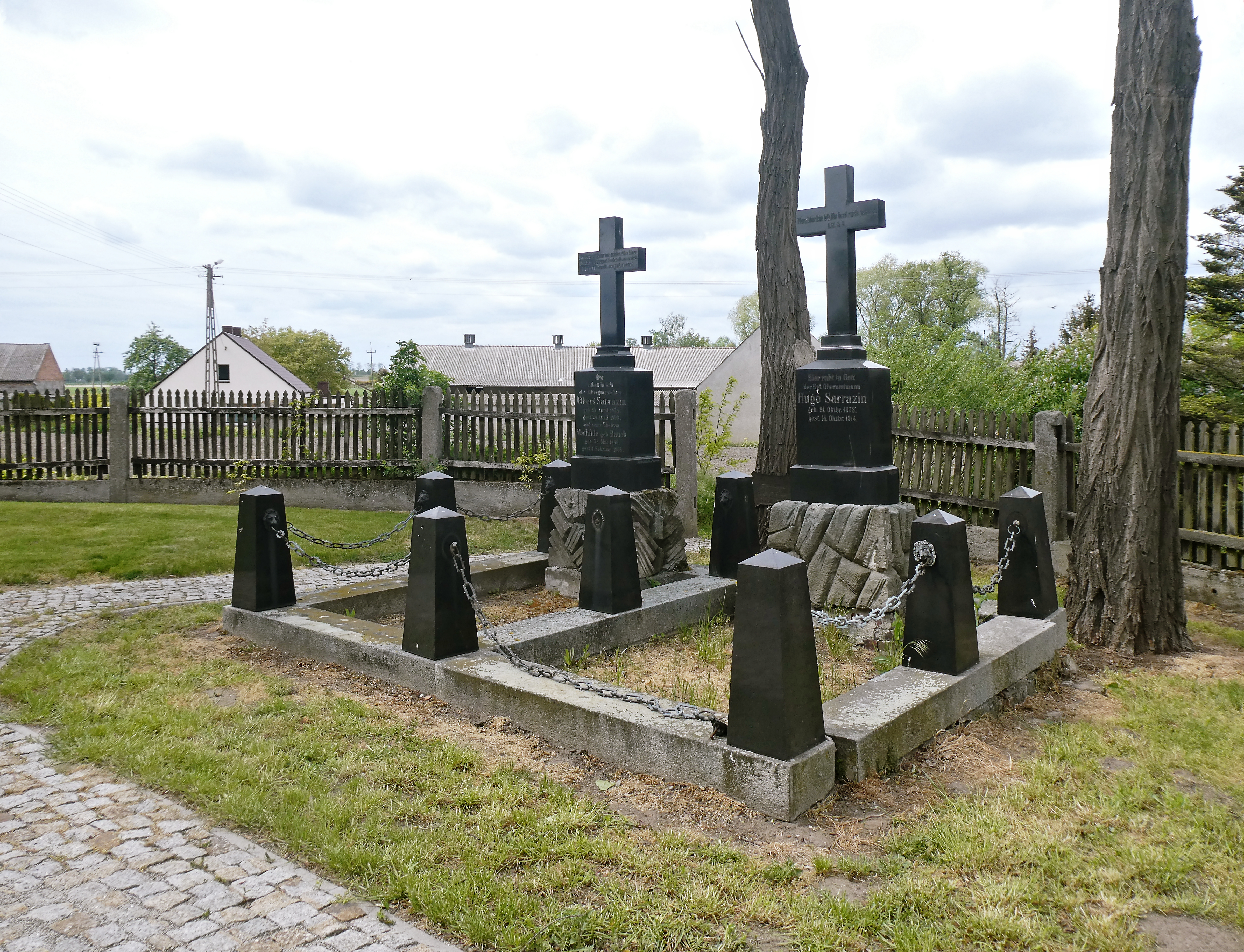 Śnieciska, groby przy kościele parafialnym)